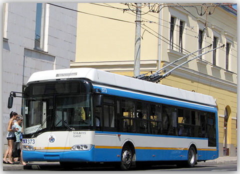 Járművezetés